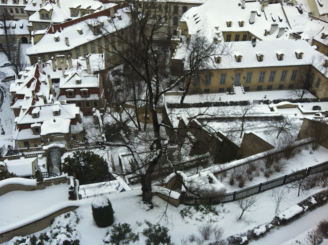 Praha, Kolovratská zahrada (uprostřed, nahoře ukončená plaňkový plotem). Vlevo část Malé Fürstenberské zahrady, vpravo část Velké Pálffyovské zahrady.